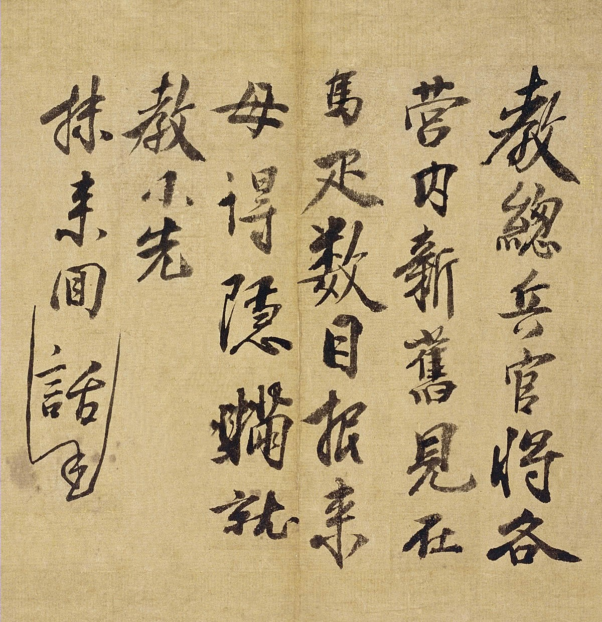 朱元璋書法真跡